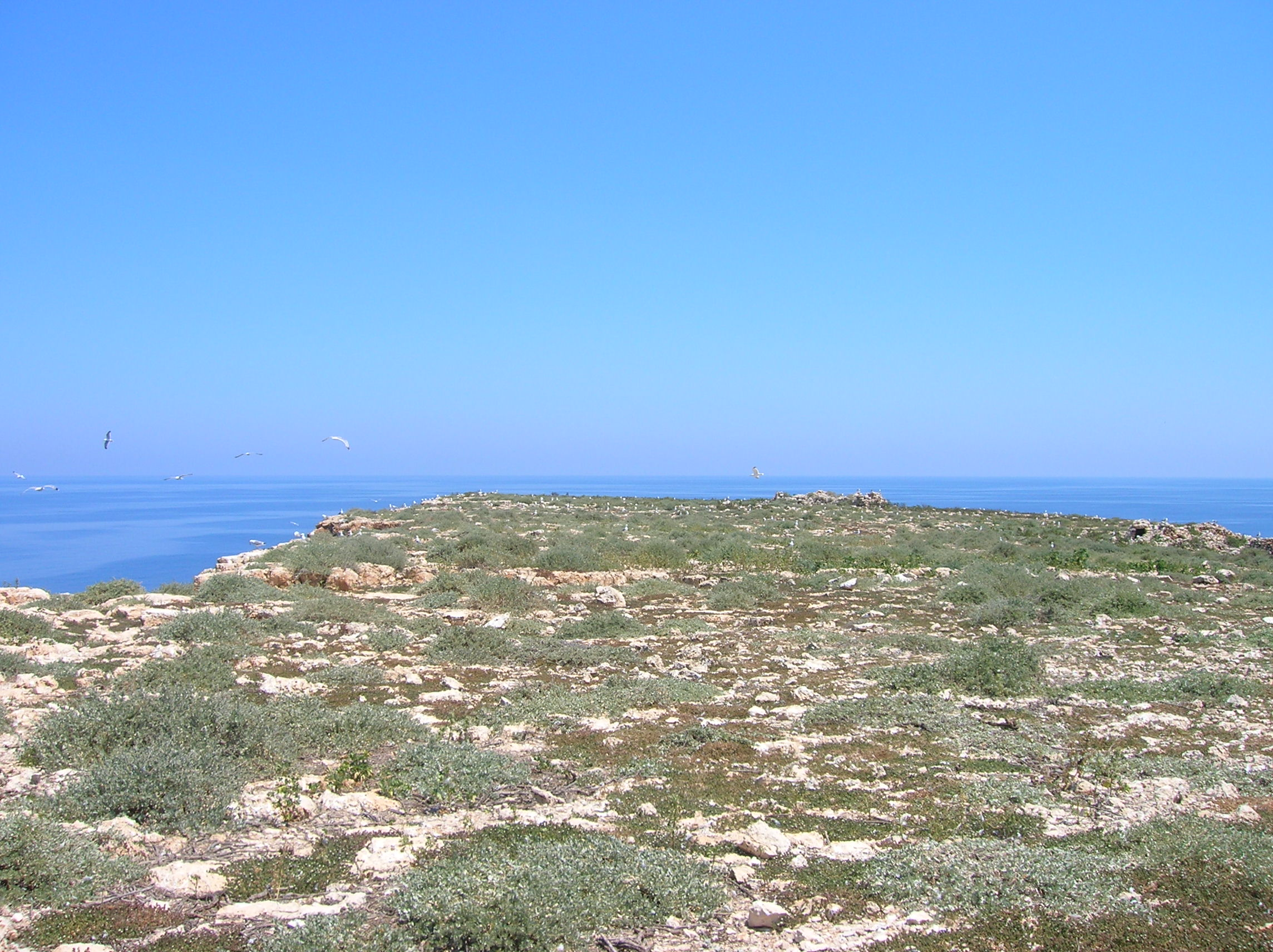 Isola di Lampione superficie